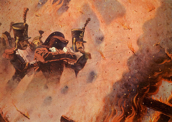 Сквозь пожар